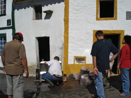 Lavagem dos utensílios depois da vindima e da 'pisa' das uvas, em Domingos da Vinha, Concelho de Gavião.